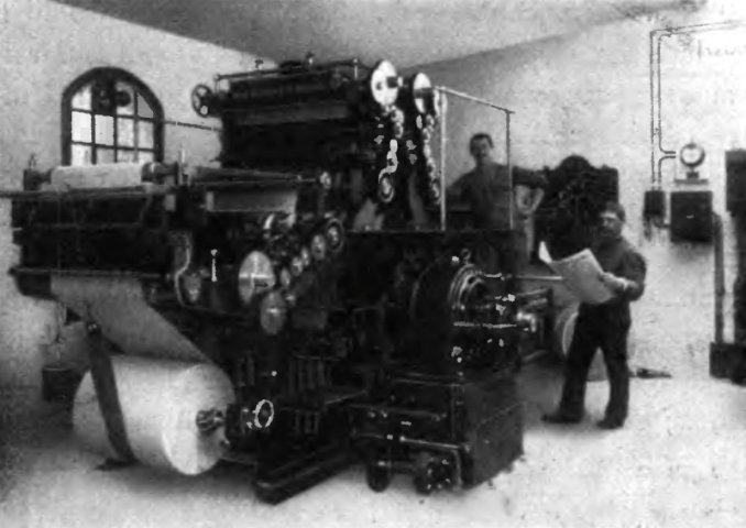 Maszyna rotacyjna w jednej z drukarni w Bydgoszczy - zdjęcie z pocz. XX w.